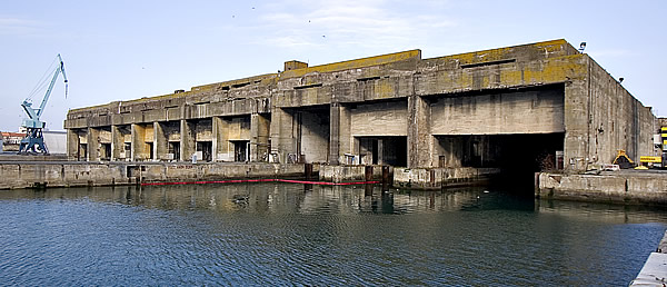 Base sous marine (WWII) du port de La Pallice vue Sud-Ouest. Pep.per de Ré Photo issue de ma banque d'images